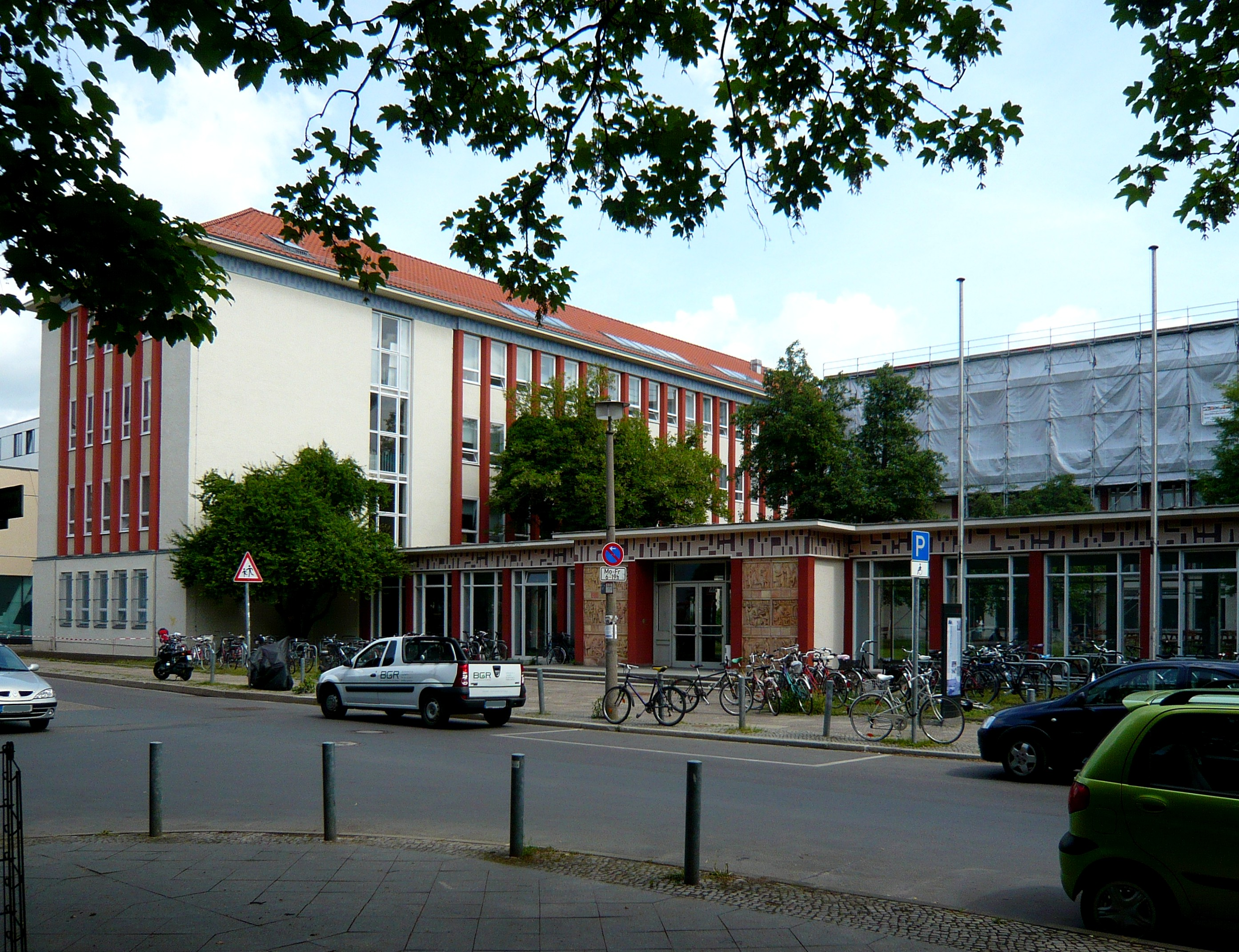 Weißensee, Bühringstr., Kunsthochschule